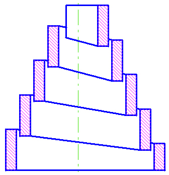 progresivní spirálová pružina tlačná